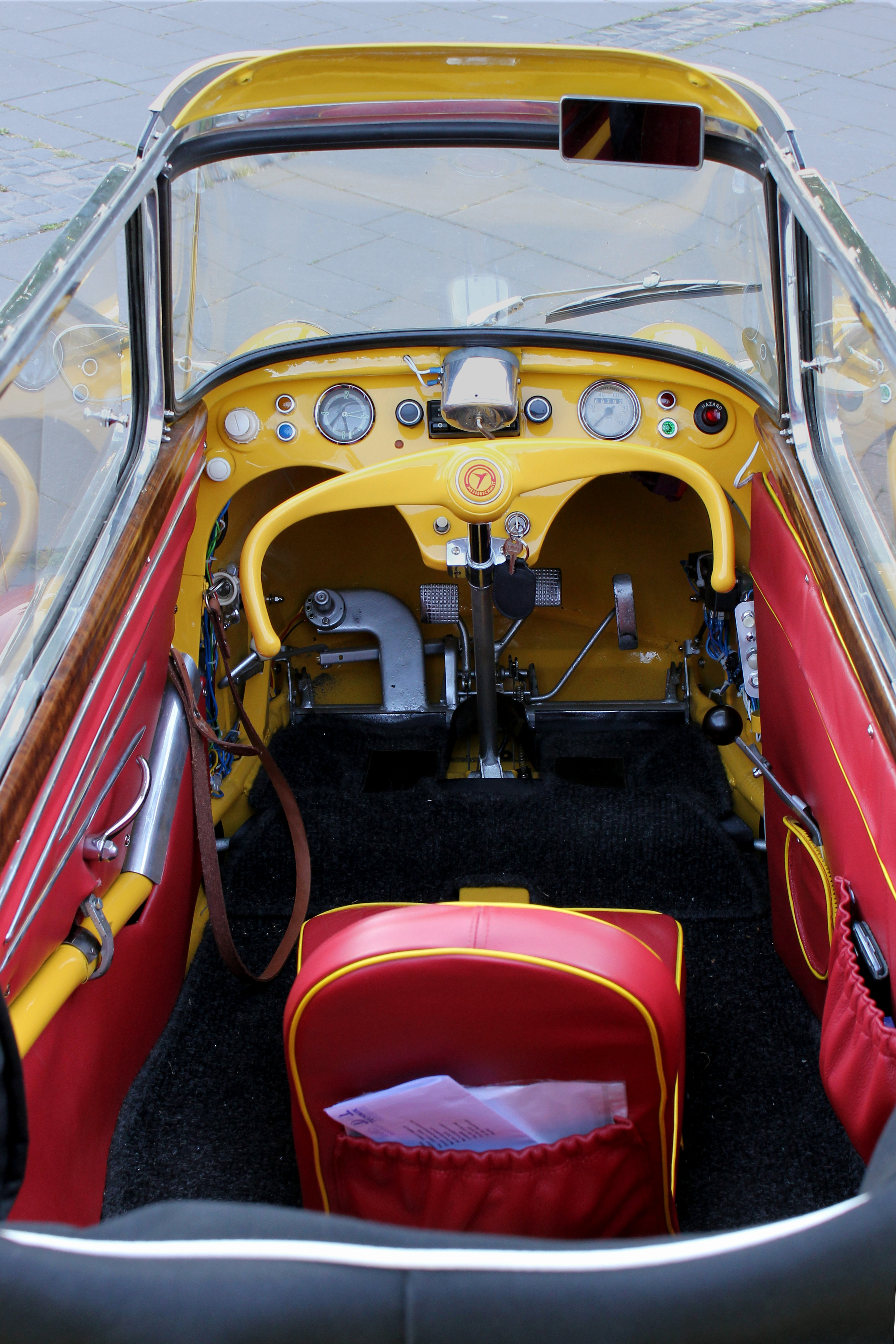 Cockpit eines Messerschmitt KR 200 Cabrio-Limousine. Die offen liegende Verkabelung und der große Scheibenwischermotor über der Radioblende sind nicht original.